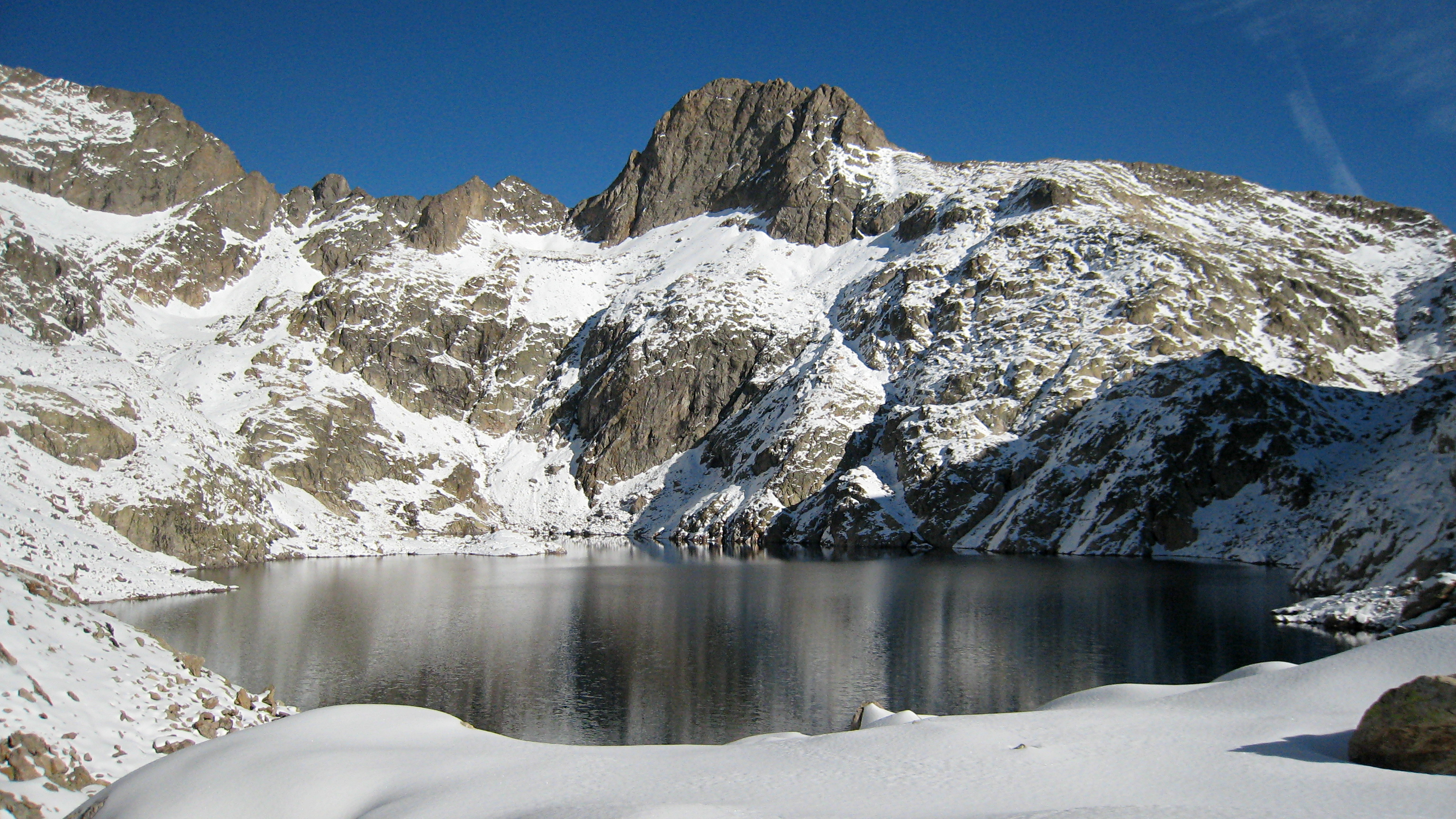 La cime de la Maledie et le lac long